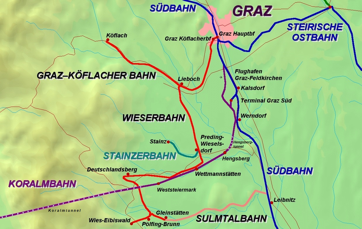 Landkarte Eisenbahnen in der Südweststeiermark (GKB, Wieserbahn, Sulmtalbahn, Stainzerbahn, Südbahn, Koralmbahn